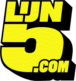 logo Lijn5 De NPS heeft toestemming gegeven voor het gebruik van de afbeelding conform GFDL.